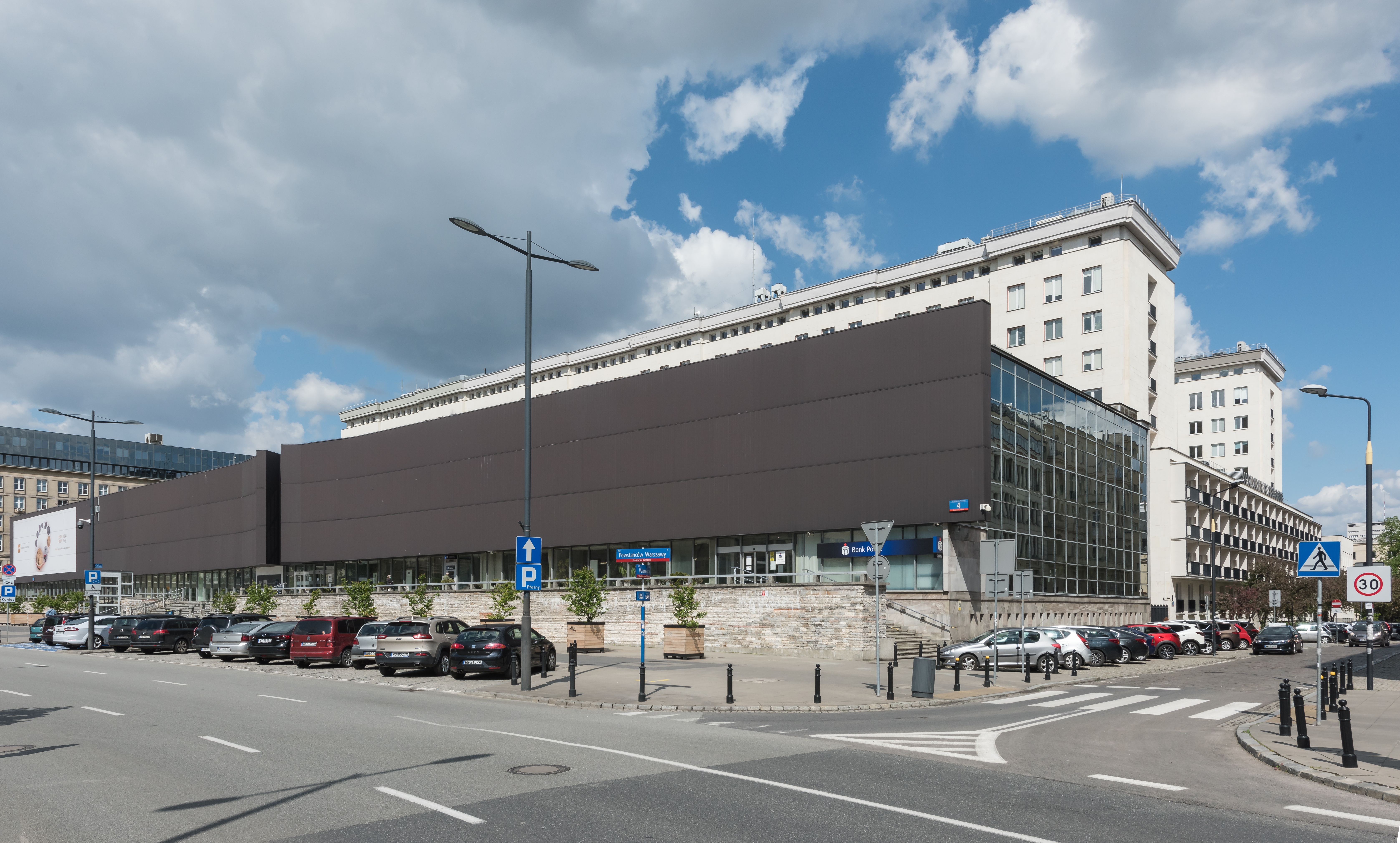 Kompleks budynków Narodowego Banku Polskiego w Warszawie, widok od strony placu Powstańców Warszawy